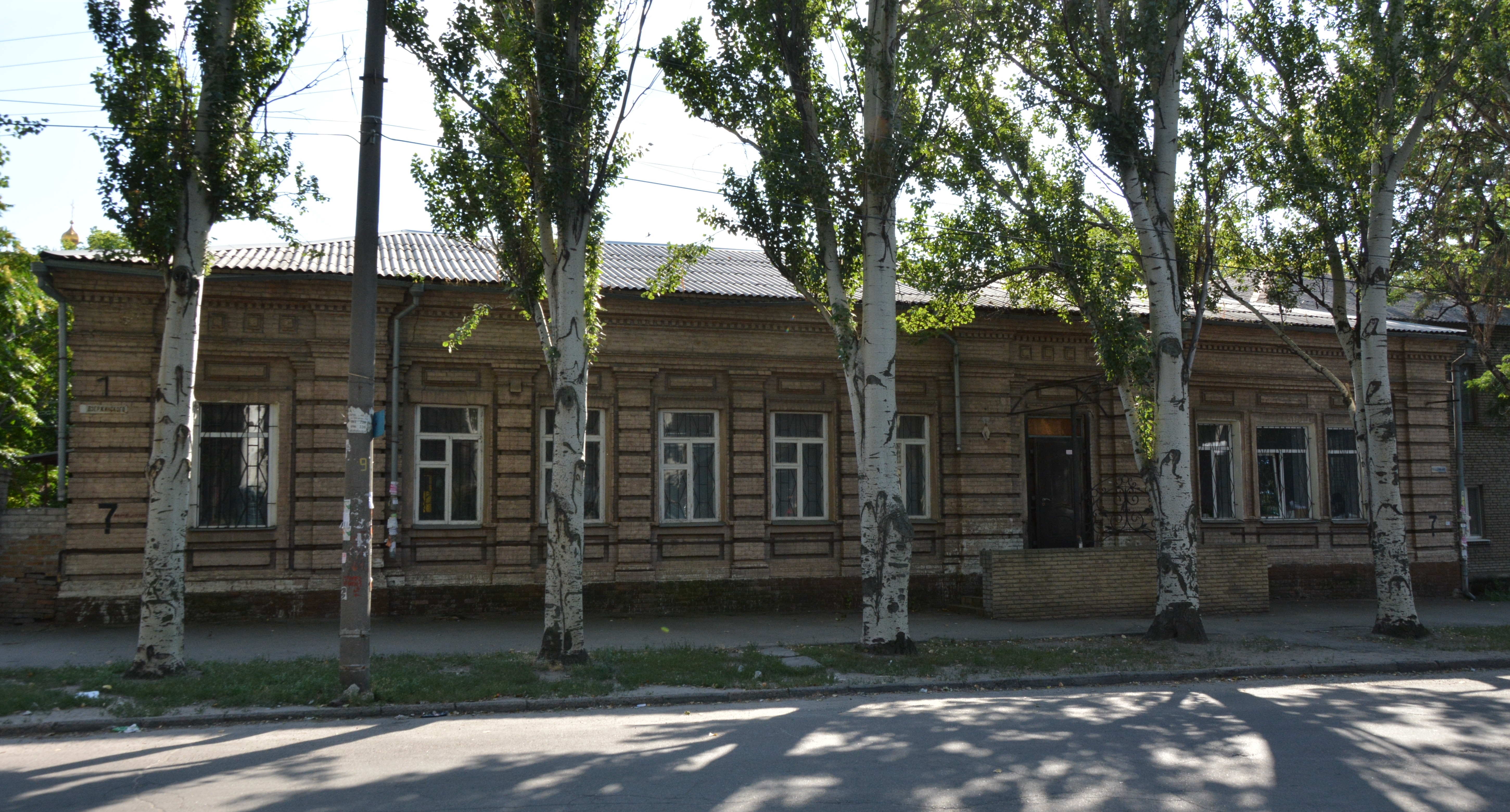 Особняк, Запоріжжя, вул. Дзержинського, 7